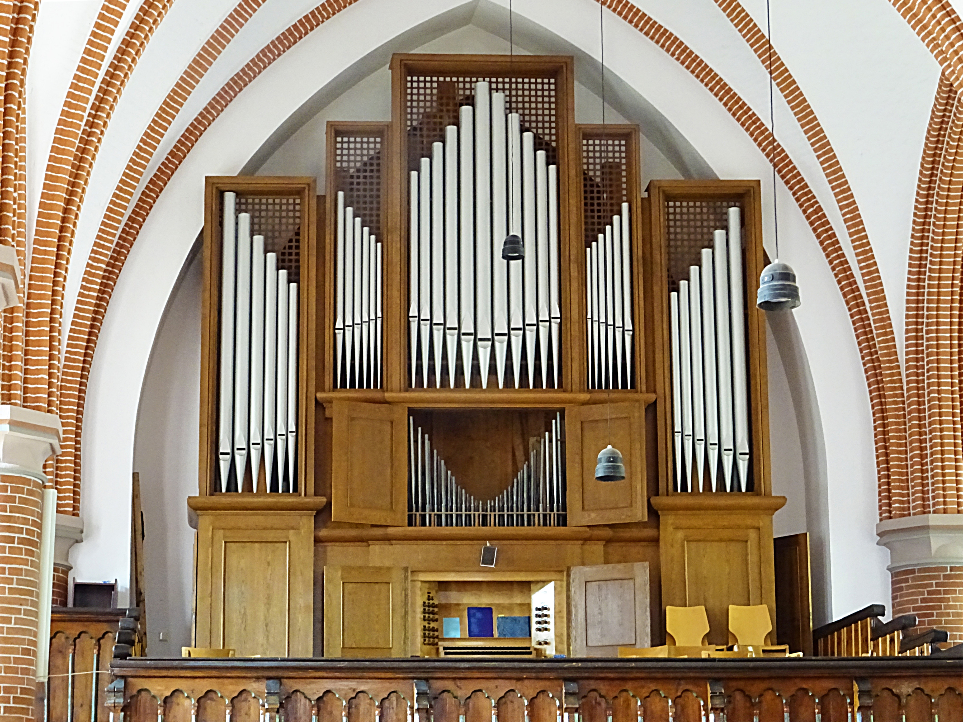 Orgel der Gebrüder Jehmlich (1956, IIP/27) in der Stiftskirche St. Georg-Marien (Ilfeld)